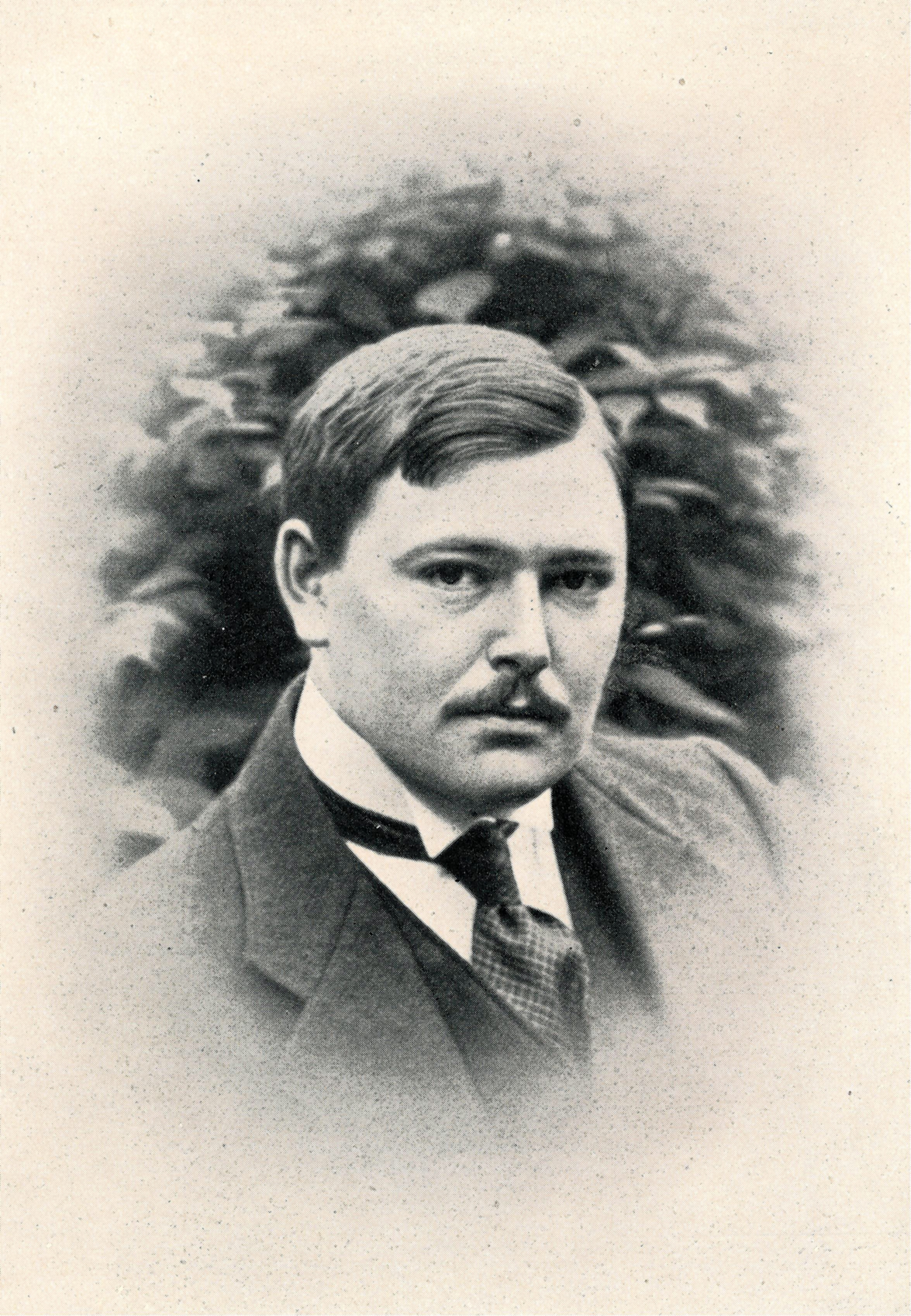 August Macke